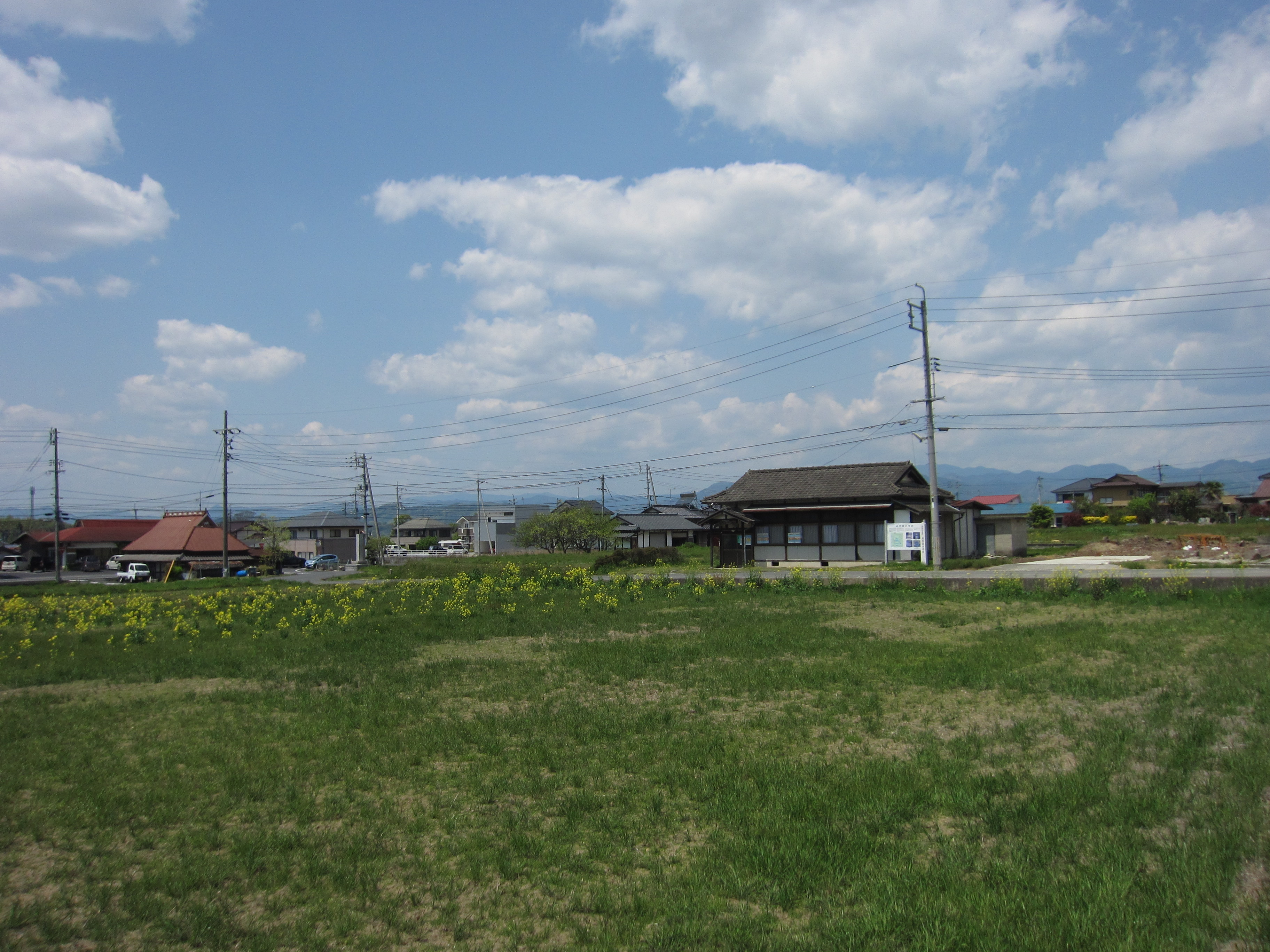 美作国分寺 遠景